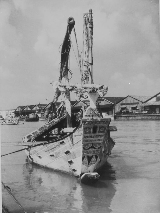 Foto. Madurese prauw in de haven van Soerabaja